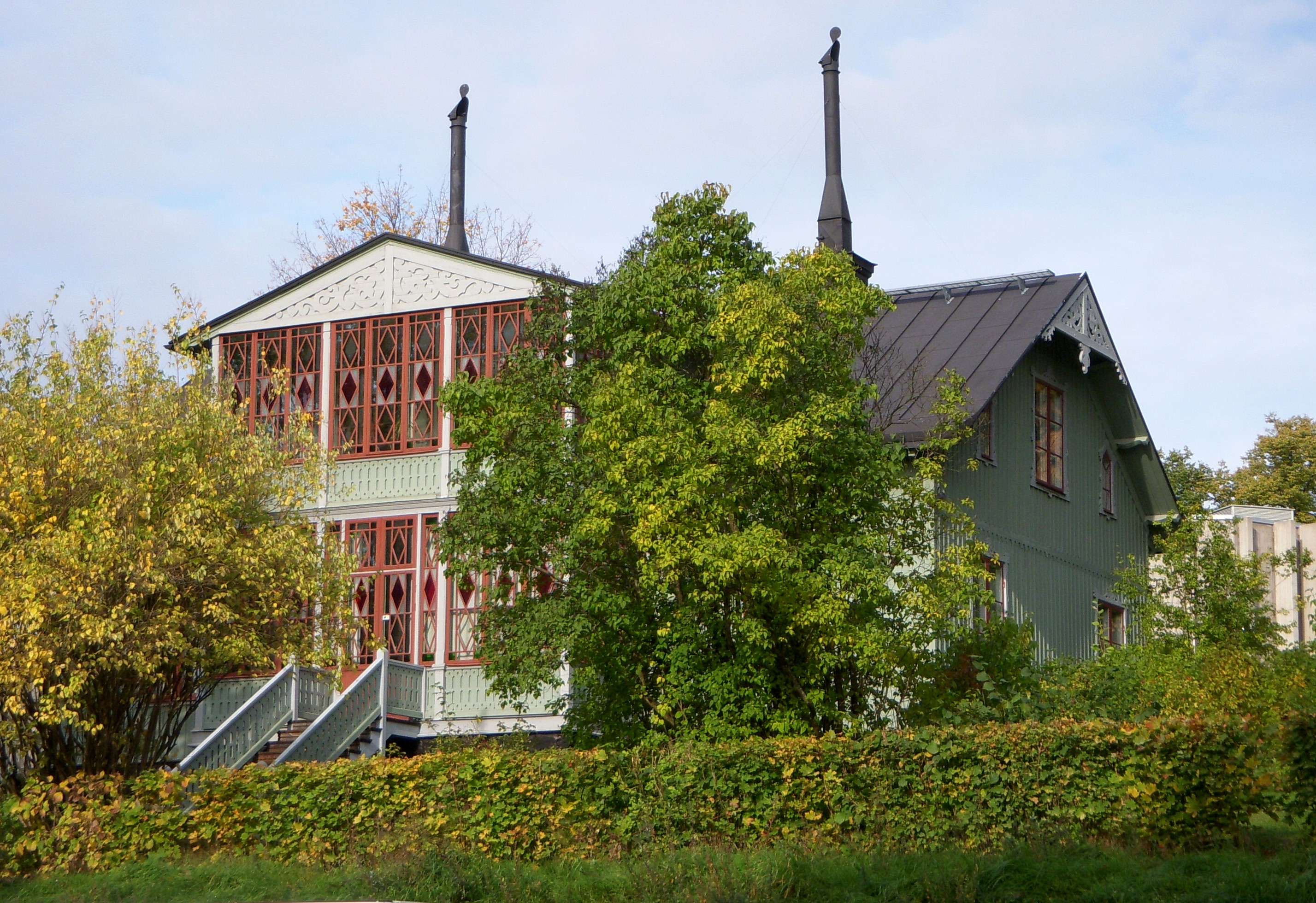 "Törnerska villan" i Diplomatstaden i Stockholm